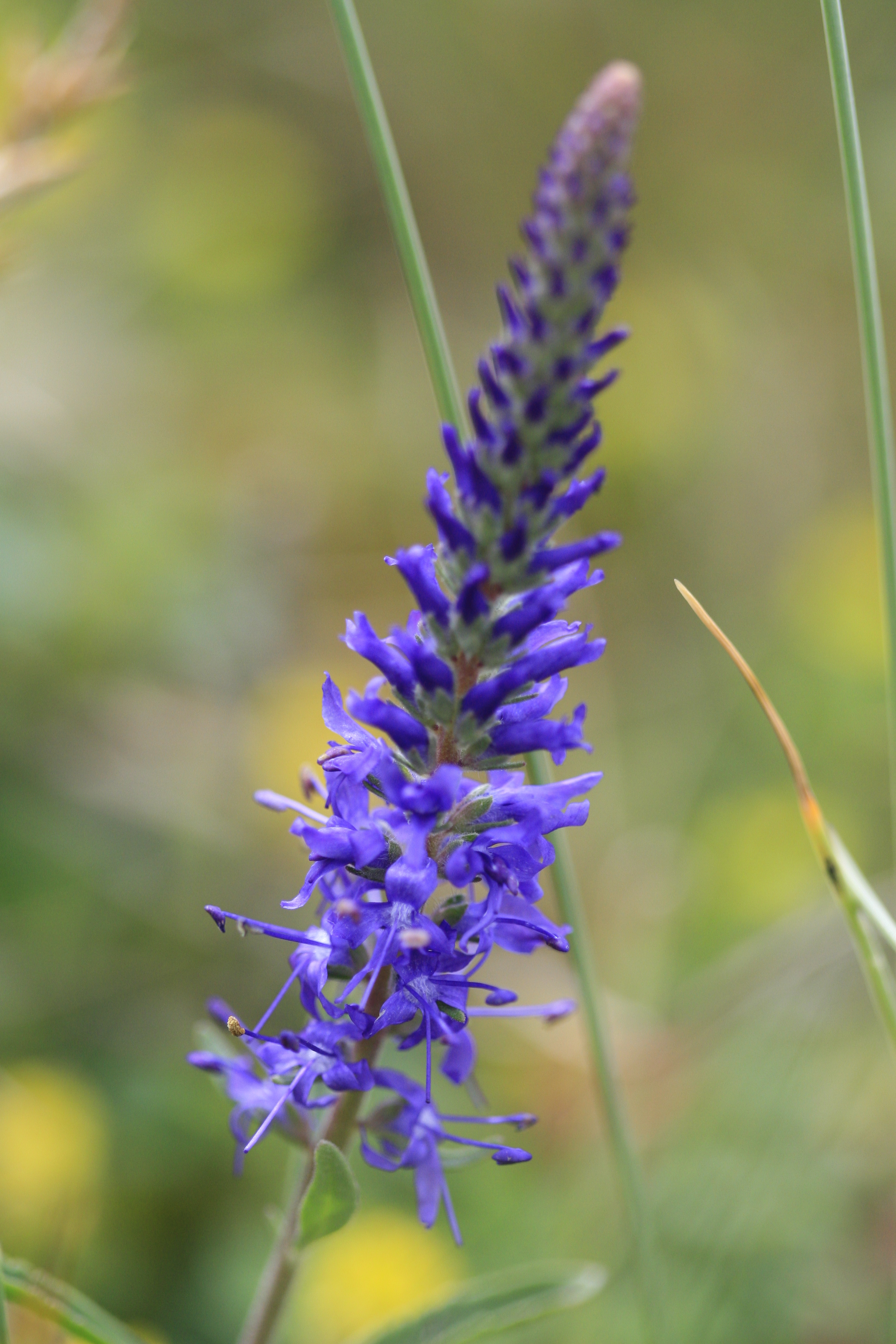 Veronica spicata